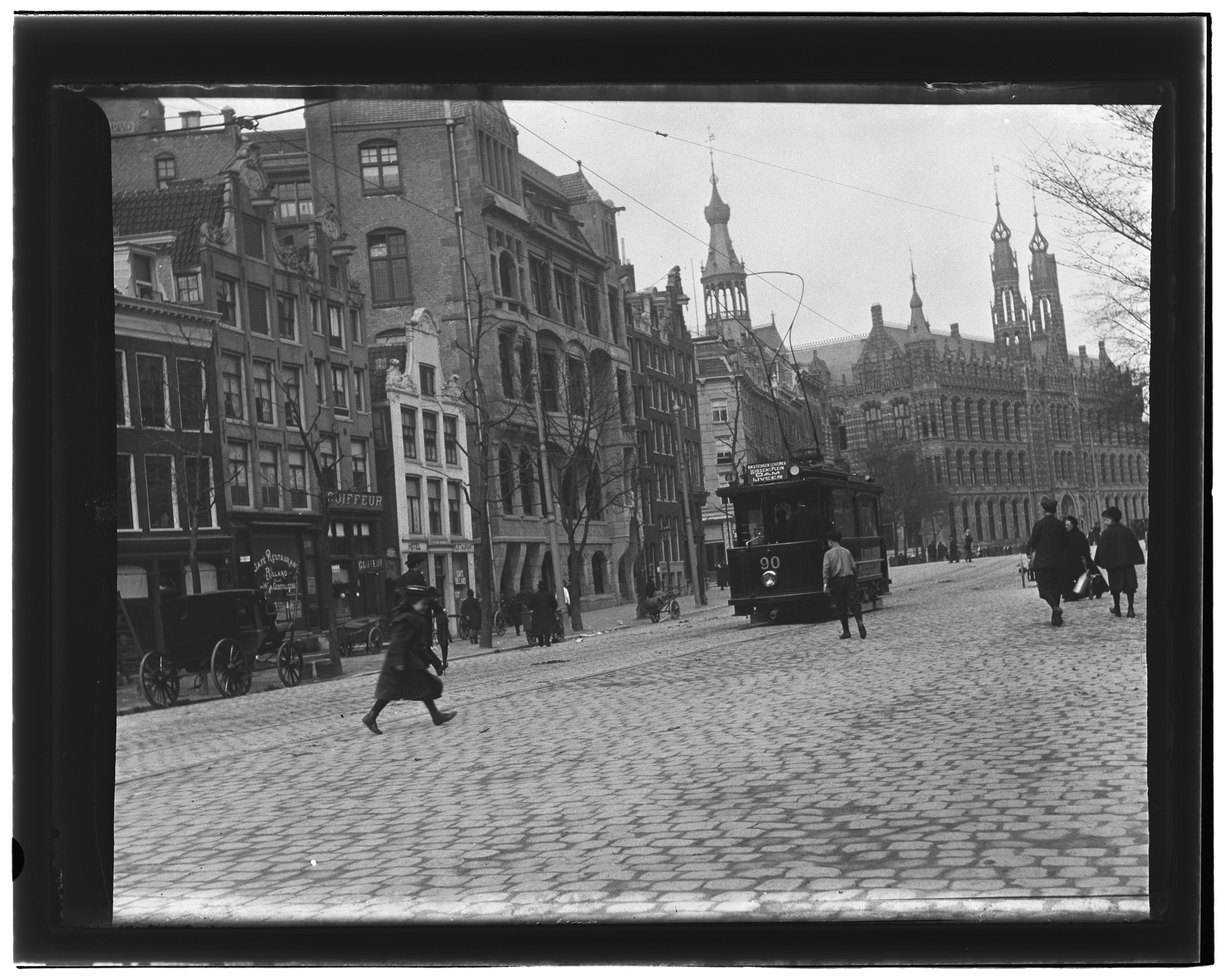 Beschrijving Nieuwezijds Voorburgwal 182 t/m 252 (v.r.n.l.) In het midden tram van lijn 1 (motorwagen 90). Rechts daarvan is ingang Paleisstraat. Op de achtergrond Hoofd Post- en Telegraafkantoor``, op nrs. 182-210. Documenttype foto Vervaardiger Olie``, Jacob (1834-1905) Collectie Collectie Jacob Olie Jbz. Datering februari 1904 Geografische naam Nieuwezijds Voorburgwal Inventarissen Afbeeldingsbestand 10019A000066 Generated with Dememorixer